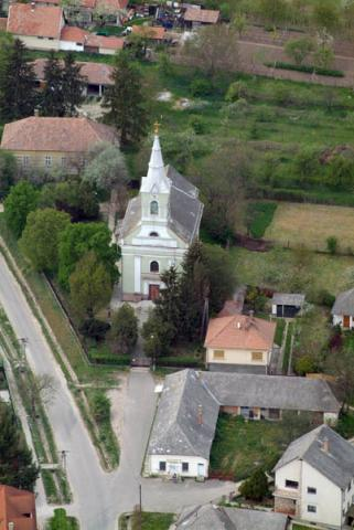 Valkó, Hungary, aerialphotography. Szent Mihály római katolikus templom